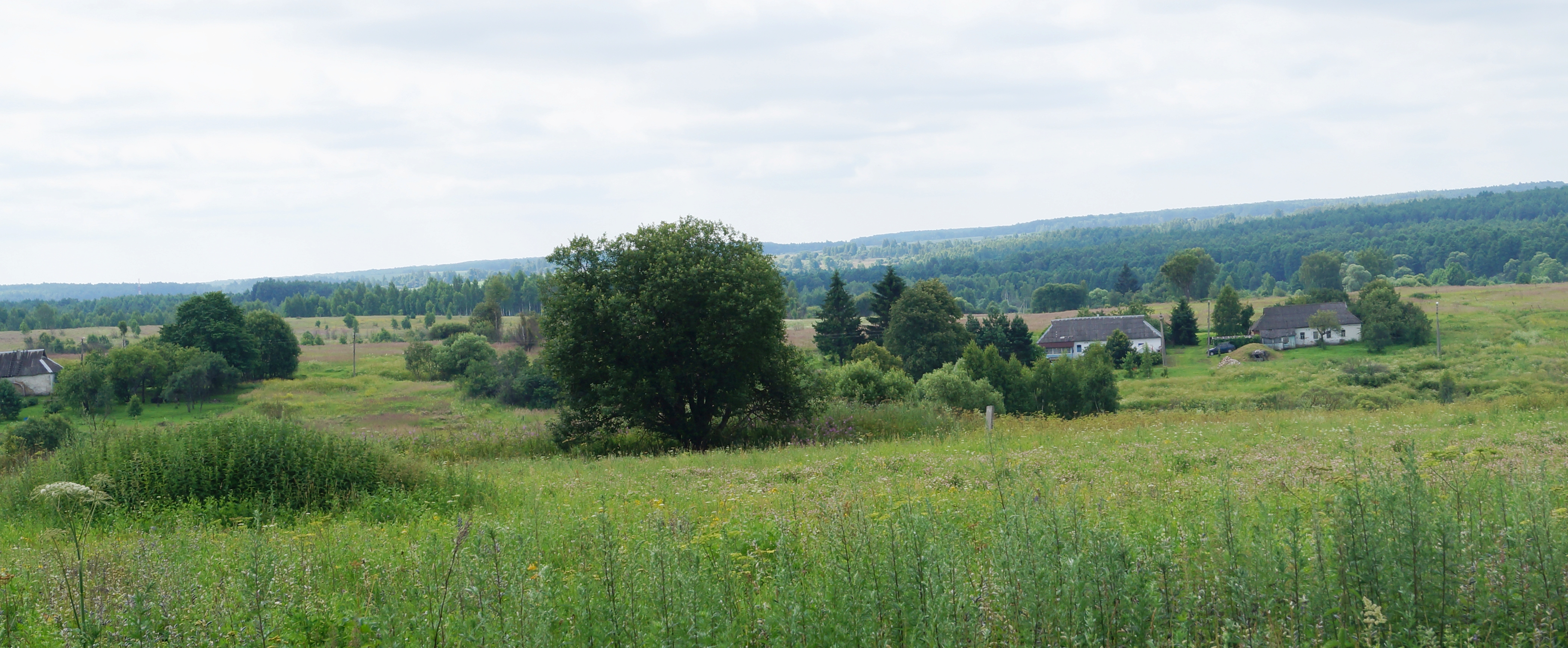 Каменка (Думиничский район)